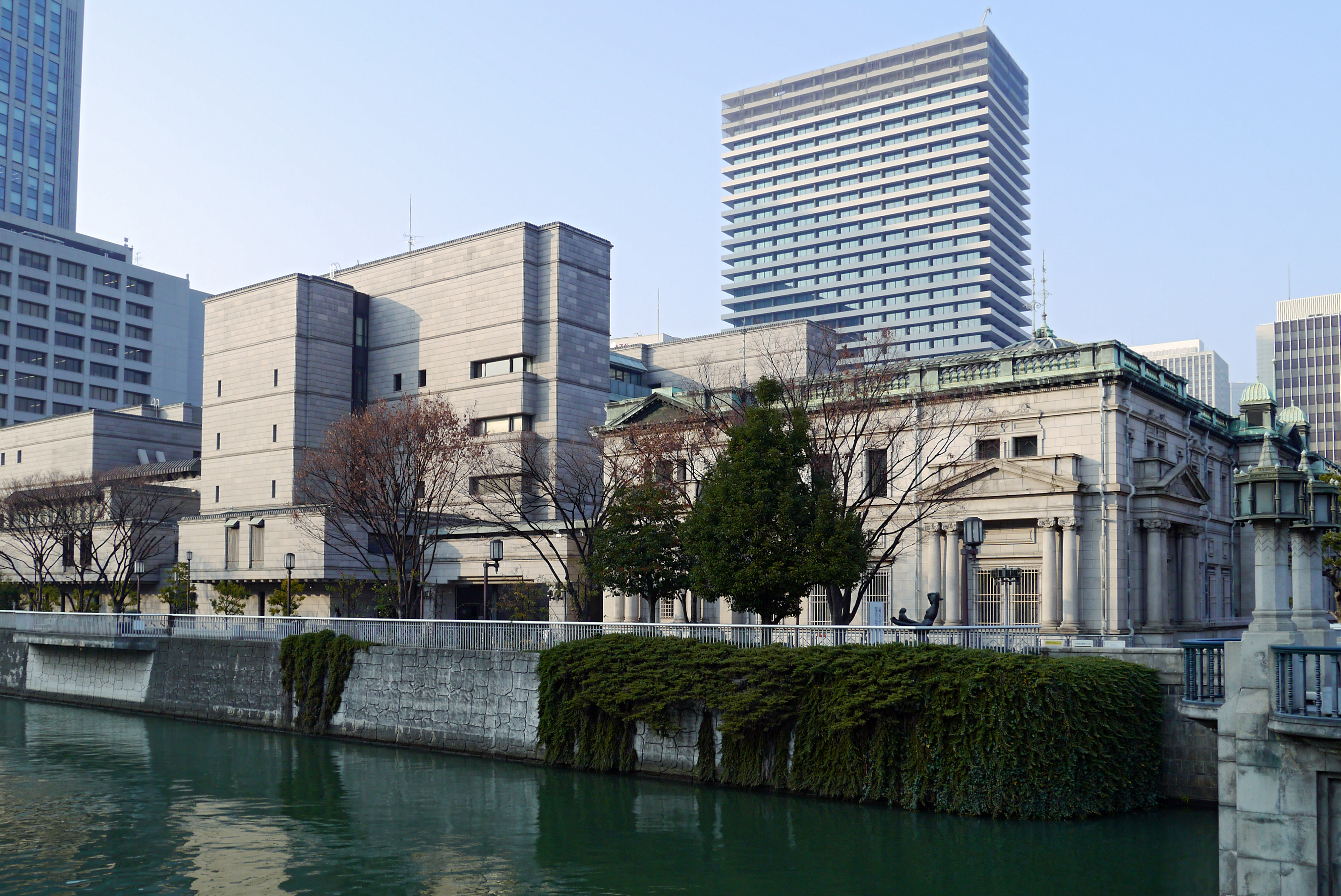 Bank of Japan Osaka Branch (日本銀行大阪支店), Osaka, Osaka prefecture, Japan